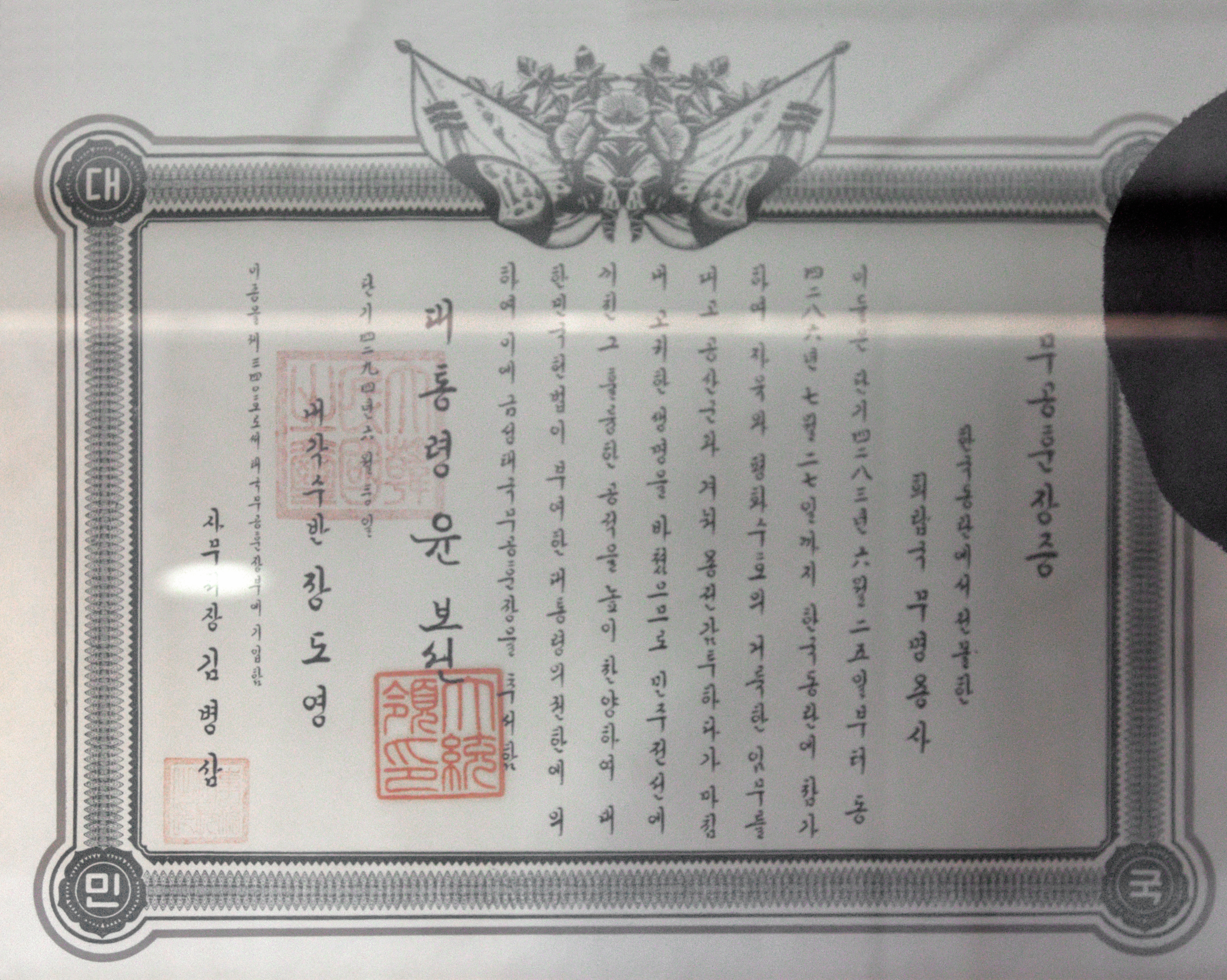 Hellenic War Museum (Athens, Greece). --- Πολεμικό Μουσείο Ελλάδος. Αθήνα.